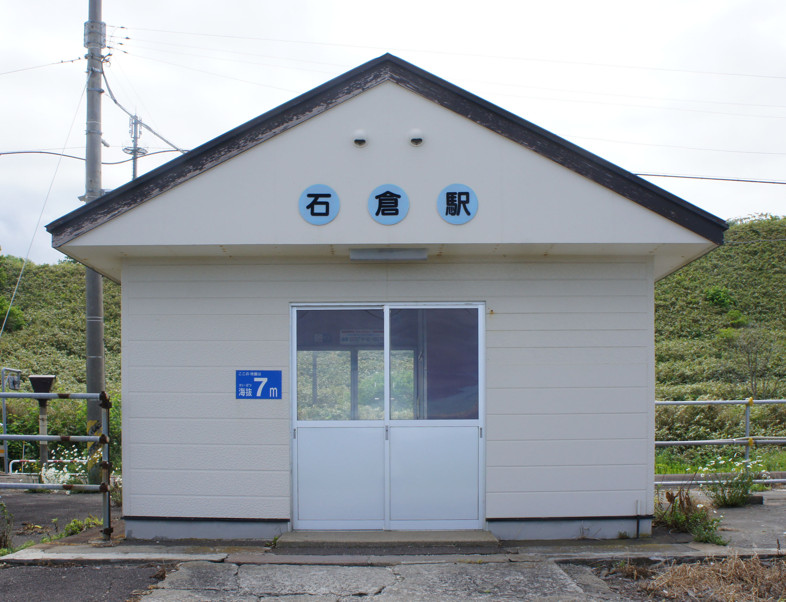 JR函館本線・石倉駅の駅舎